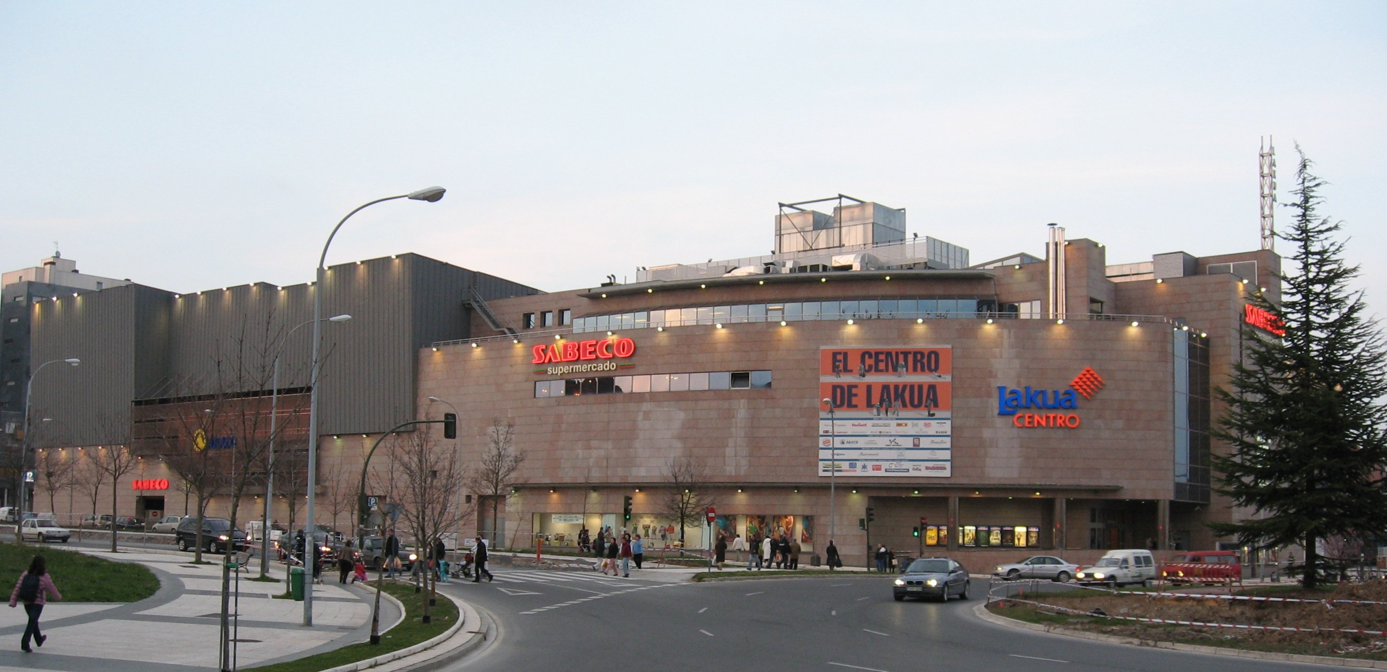 Desc: Centro comercial Lakua